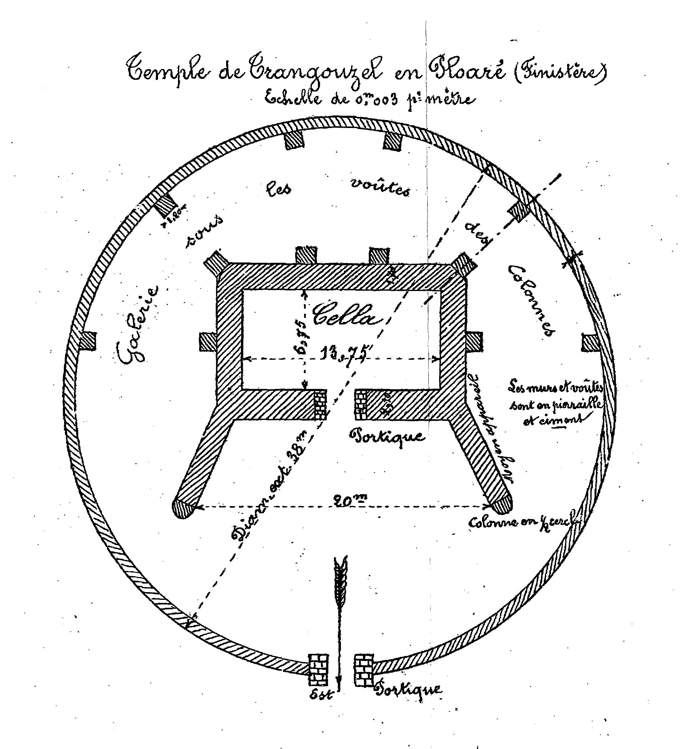 Premier plan publié (largement revu depuis) du temple de Trégouzel ou fanum celto-romain, par le baron M. Halna du Fretay (1835-1901).